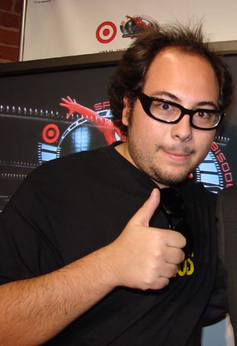 Nicolás López